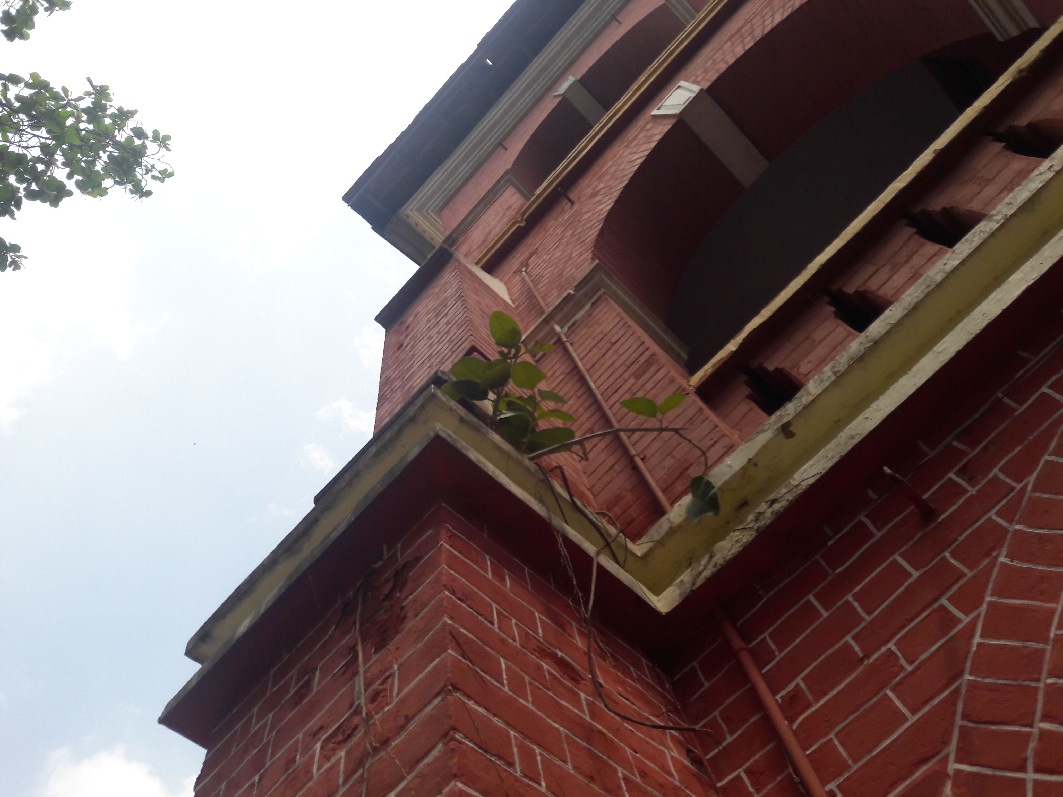 ഗവ. മോഡൽ ബോയ്സ് എച്ച്.എസ്.എസ്, തൈക്കാട് കെട്ടിടത്തിന് മേലെ പ്രതികൂല സാഹചര്യങ്ങളില്‍ വളരുന്ന ഒരു പേരാല്‍.banyan tree ശാസ്ത്രീയ നാമം Ficus benghalensis കുടുംബം Moraceae.